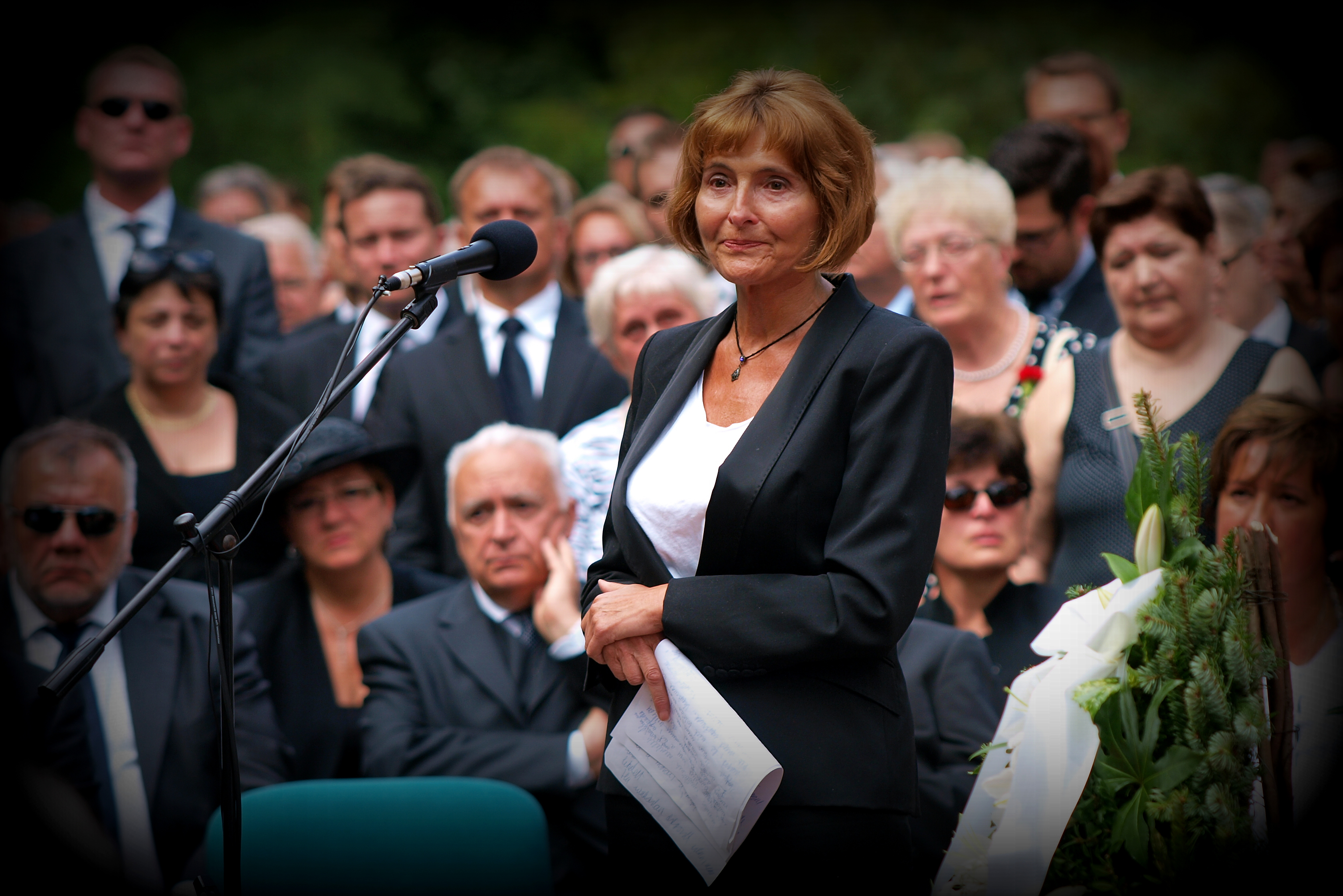 Lendvai Ildikó volt képviselő Kiss Péter temetésén (2014-08-15)